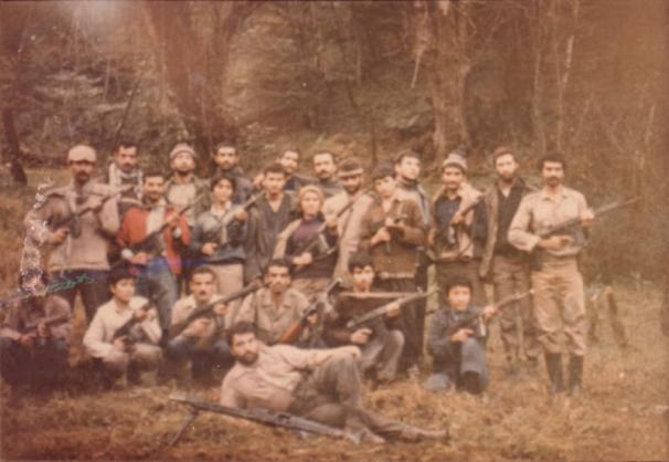 چندتن از اعضای سربداران آمل در جنگل مازِرونی: آملی سربدارون ِچنتا جنگلی که سال شصت جنگ کردنه